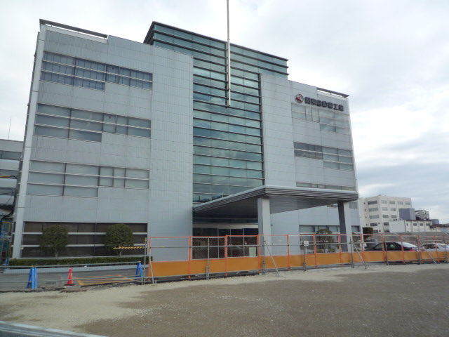 関東自動車工業本社の画像